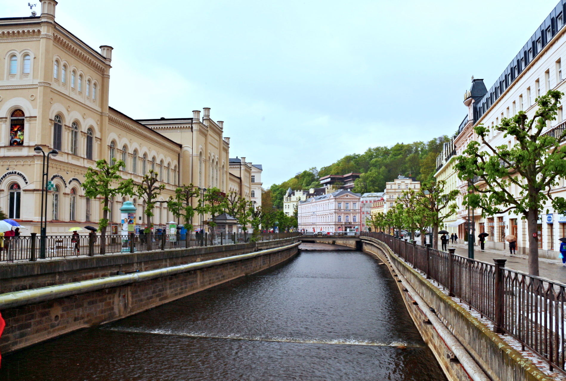 Teplá v Karlových Varech